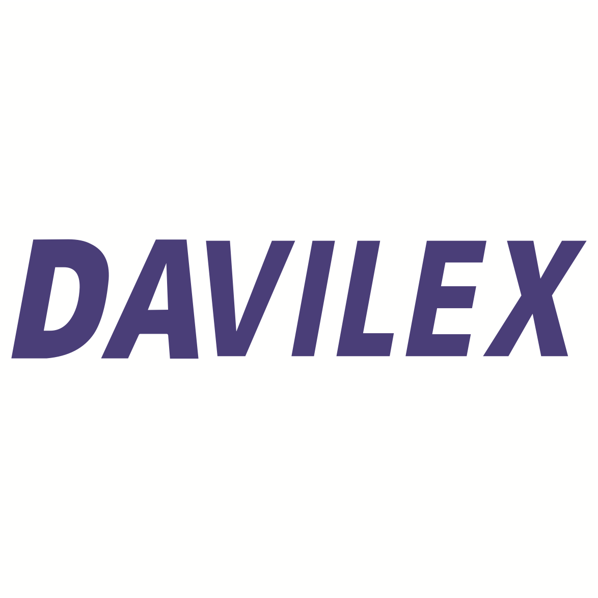 Het logo van Davilex.